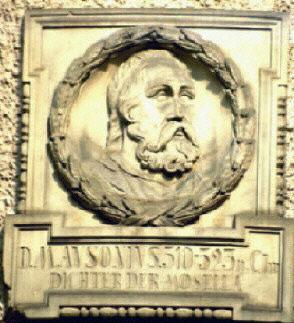 eigen foto (Trier)